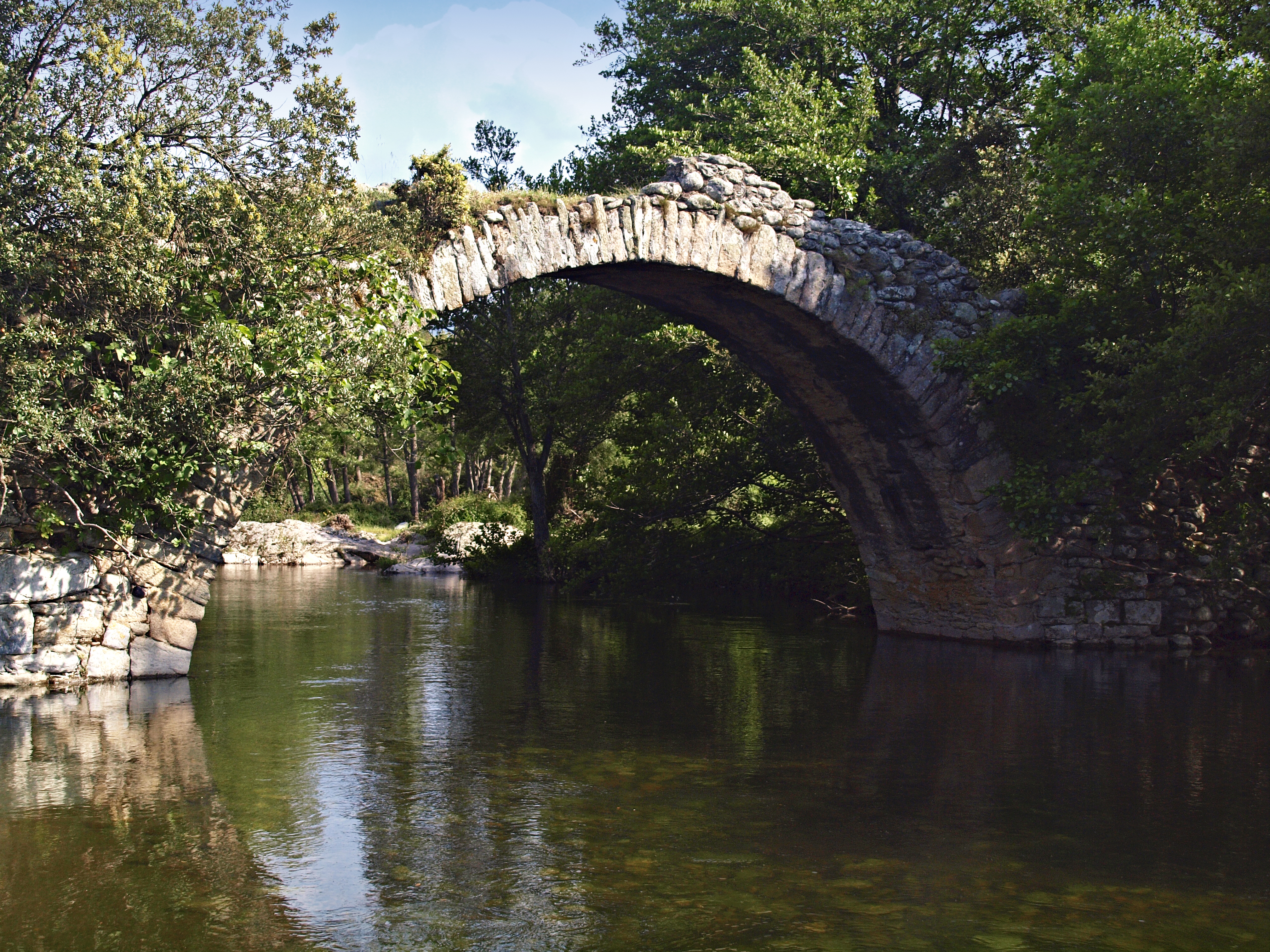 Canavaggia (Corsica) - Pont génois de Pontare sur la Tartagine